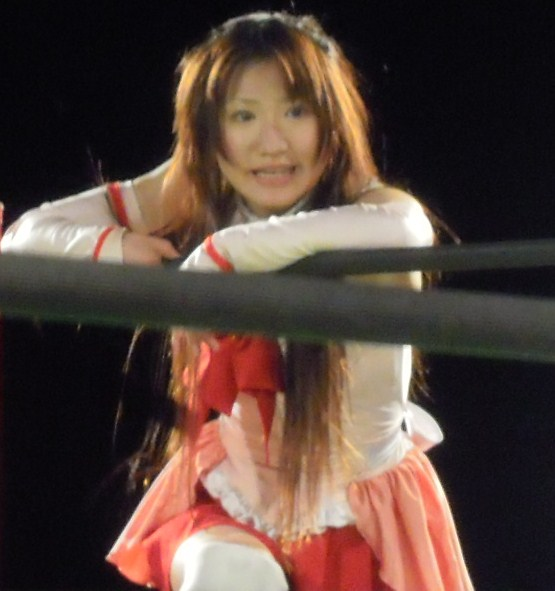 春日 萌花 Category:人物画像 WAVE新宿FACE大会